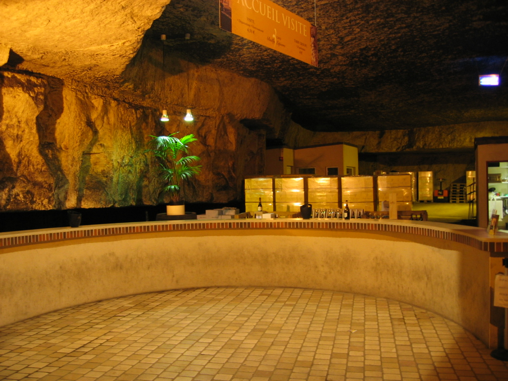 Cave de Bailly - Yonne - Bourgogne